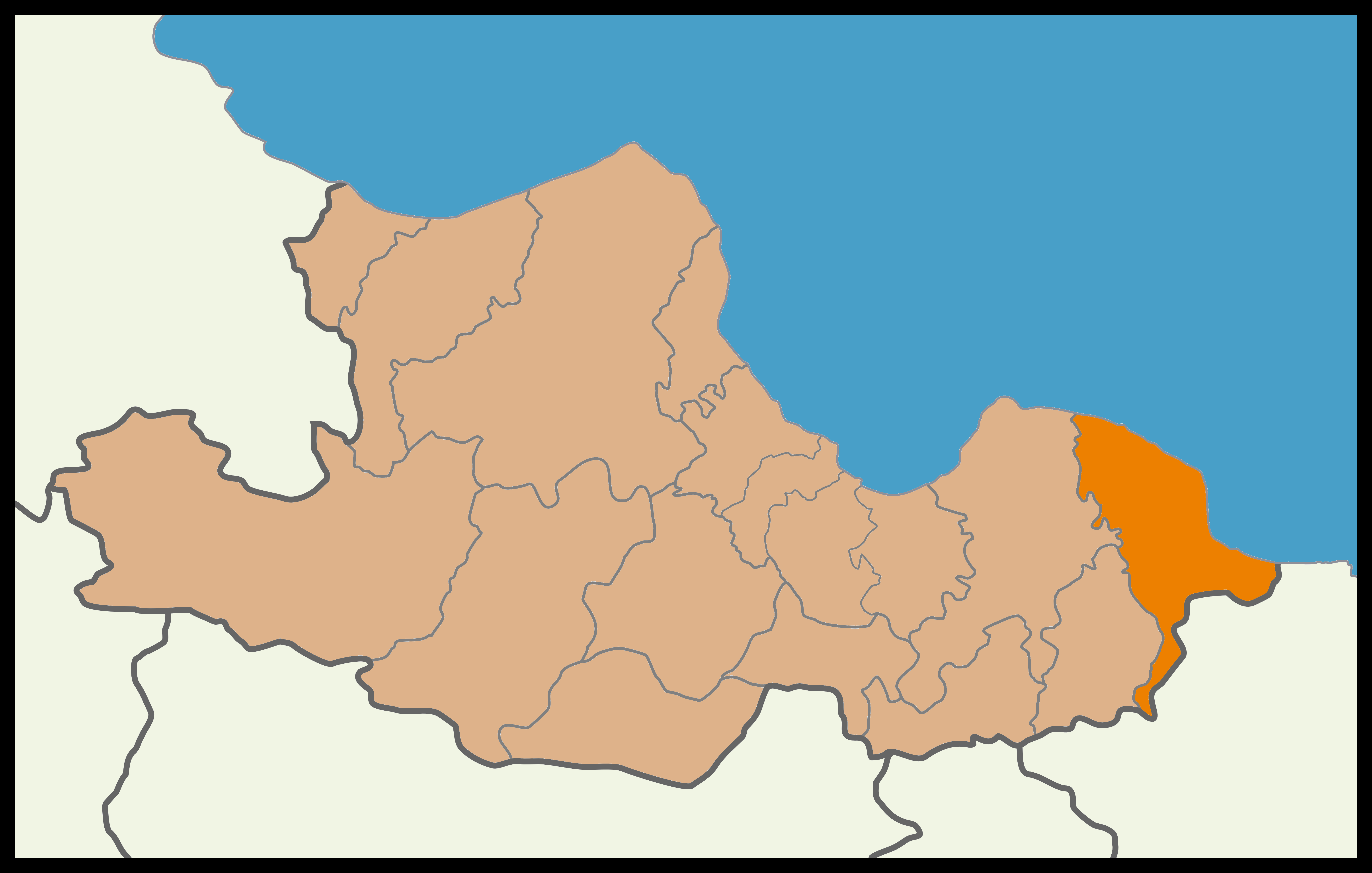 Samsun'un Terme ilçesinin 2014 Türkiye yerel seçimleri haritası.